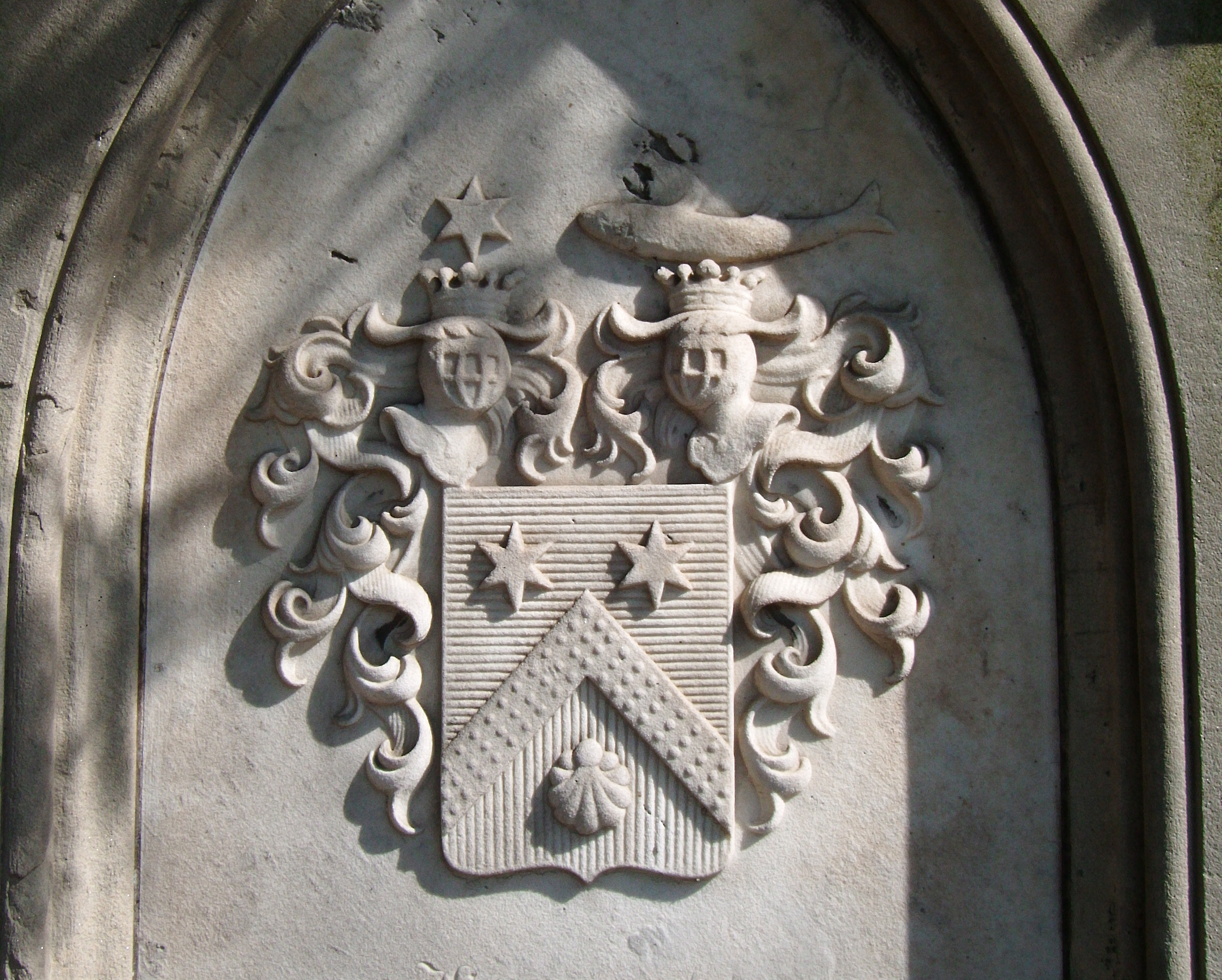 Wappen der pfalz-bayerischen Adelsfamilie von Besnard (ältere Linie), Detail von Grabstein, Hauptfriedhof Zweibrücken